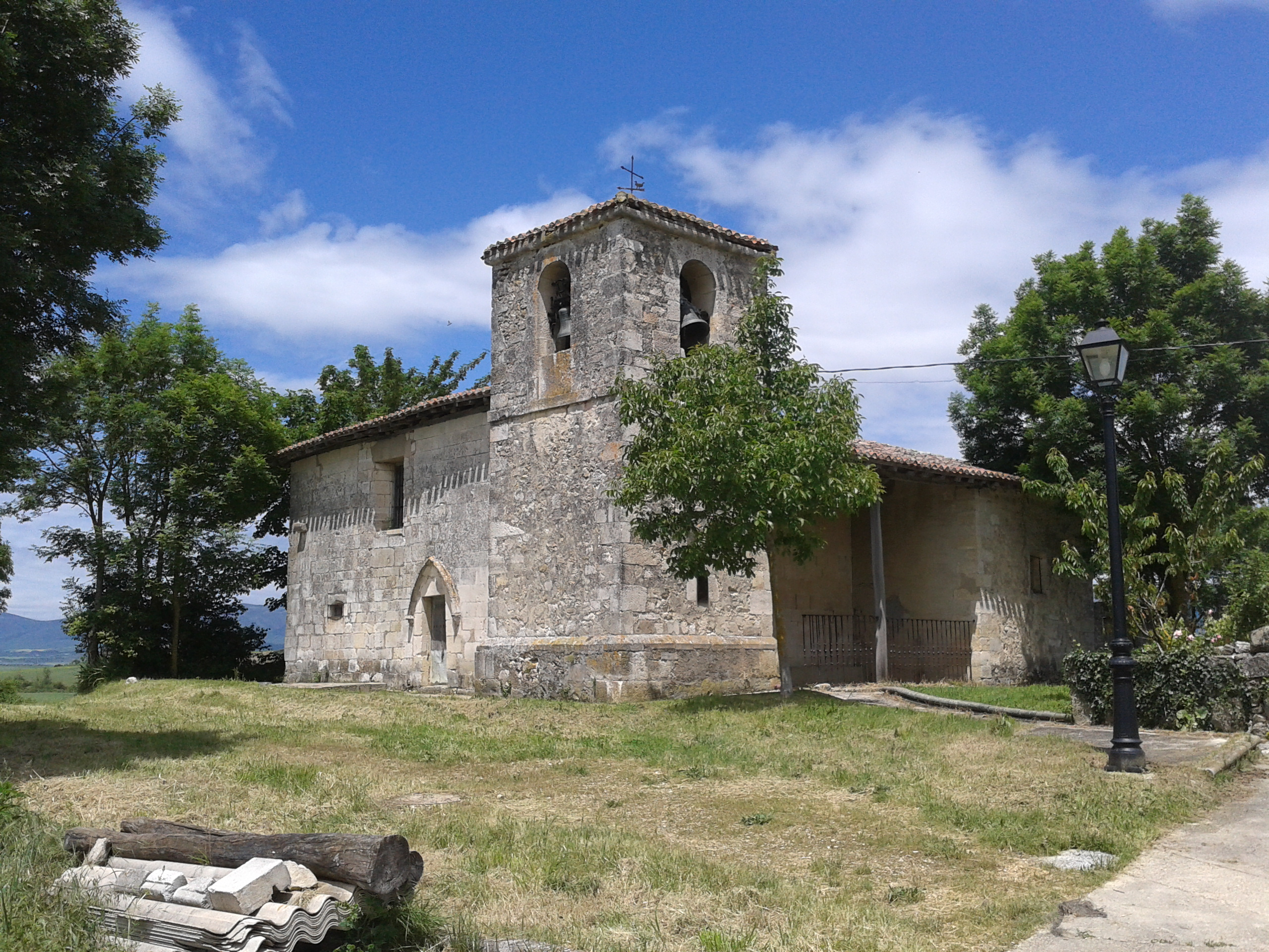 Arrizalako eliza